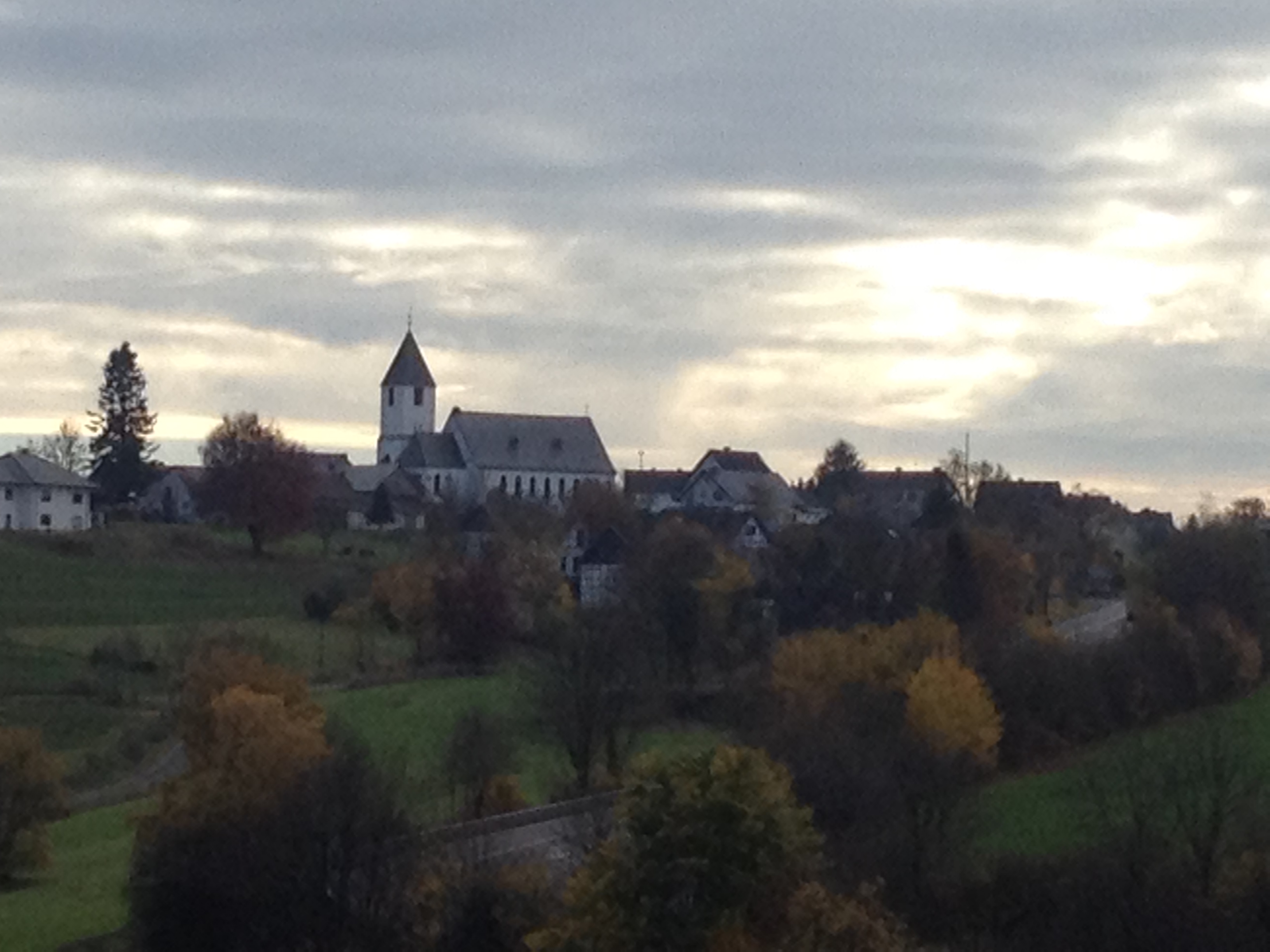 Fotoaufnahme von der Pfarrkirche hl. Sankt Bernhard in Hollerath